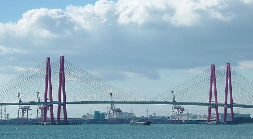 名港西大橋 投稿者 Gnsin 撮影日&場所 2005年1月9日(日) 稲永公園南の市道にて撮影。